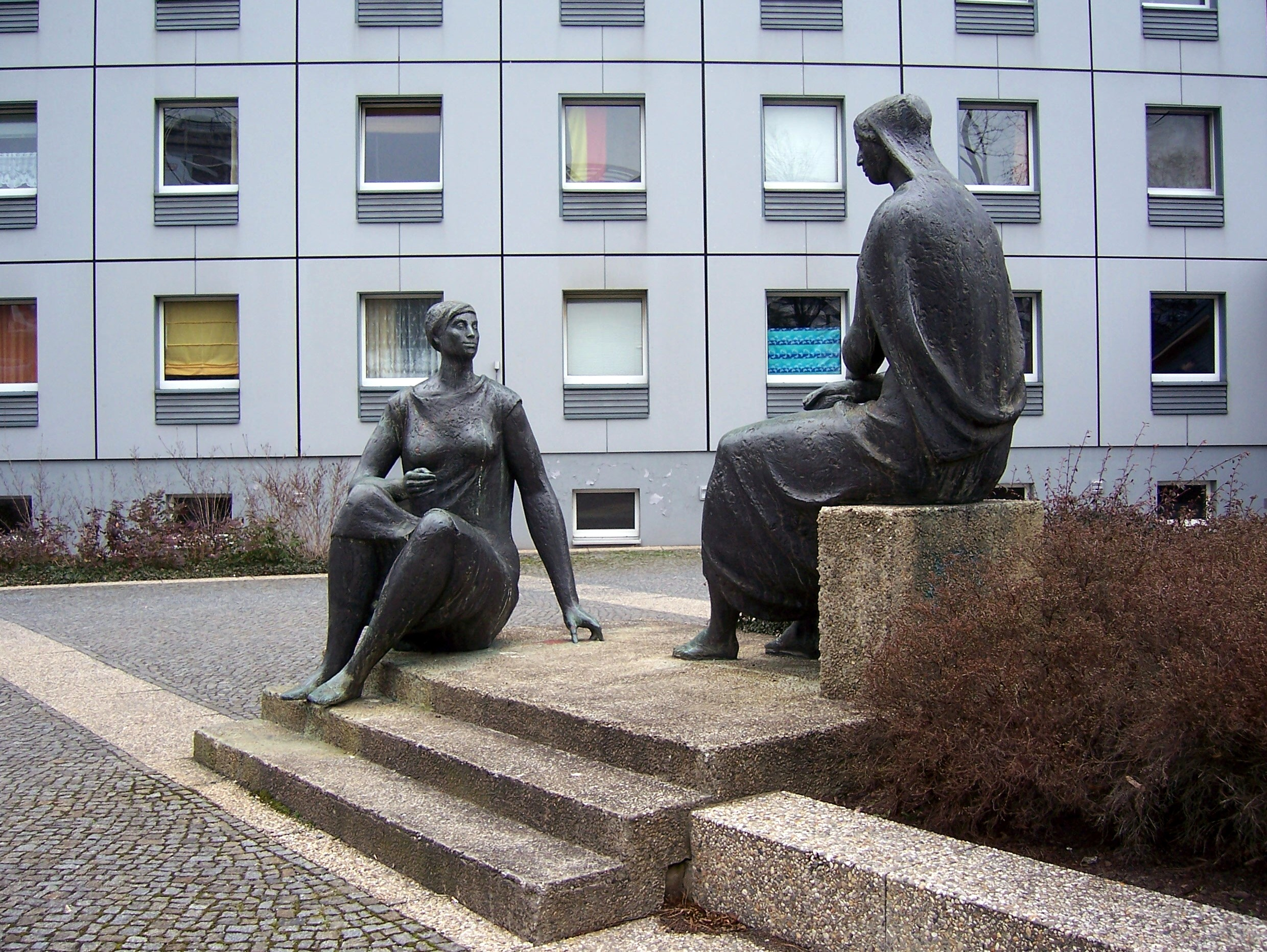 Plastik Zwei Frauen von Wieland Förster vor den Studentenwohnheimen St. Petersburger Straße 25 in Dresden